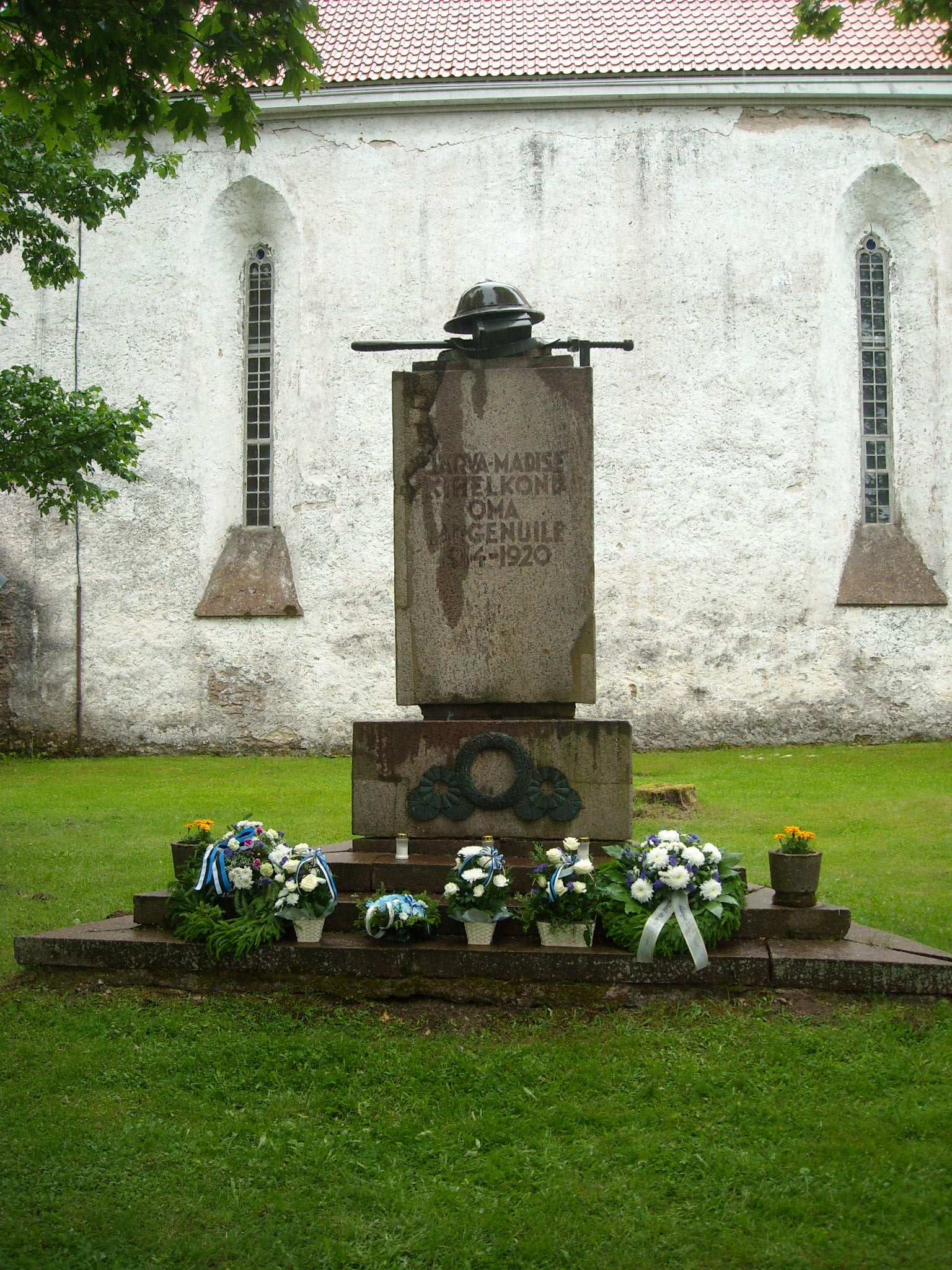 Vabadussõja mälestussammas Järva-Madisel